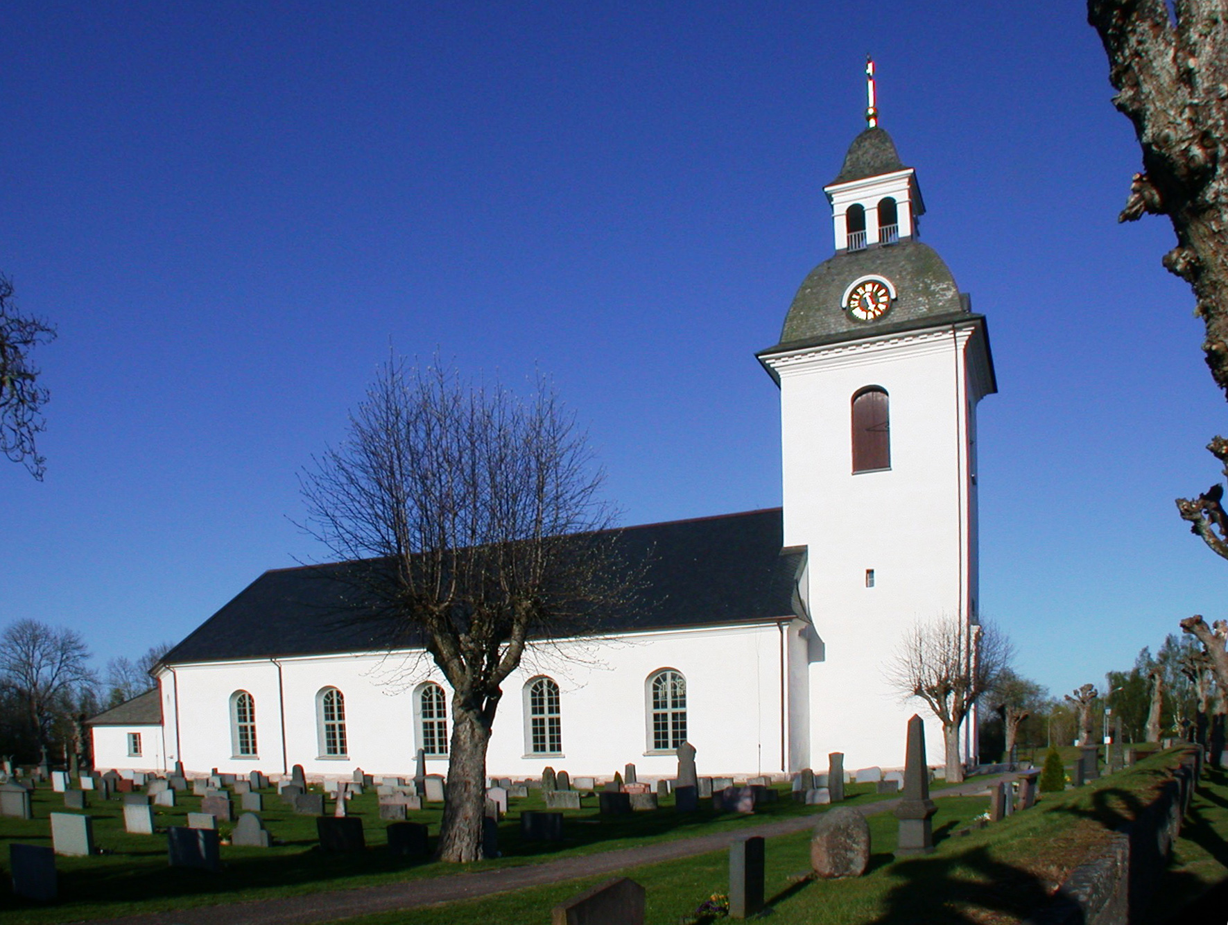 Älghult church, Uppvidinge, Sweden